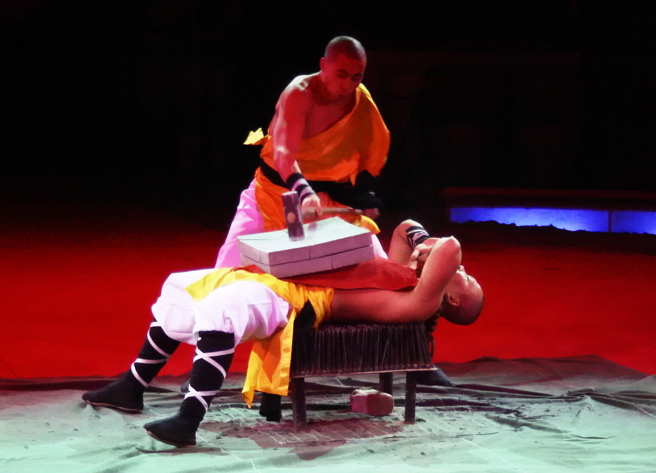 Shaolin zerschlägt mit einem Vorschlaghammer eine Steinplatte auf dem Bauch eines anderen.